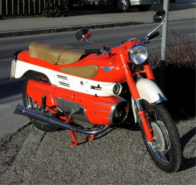 Bildbeschreibung: Aermacchi Chimera 175, Bj. 1957 Quelle: selbst fotografiert Fotograf/Zeichner: MartinHansV Datum: 3. Februar 2002 Sonstiges: ...